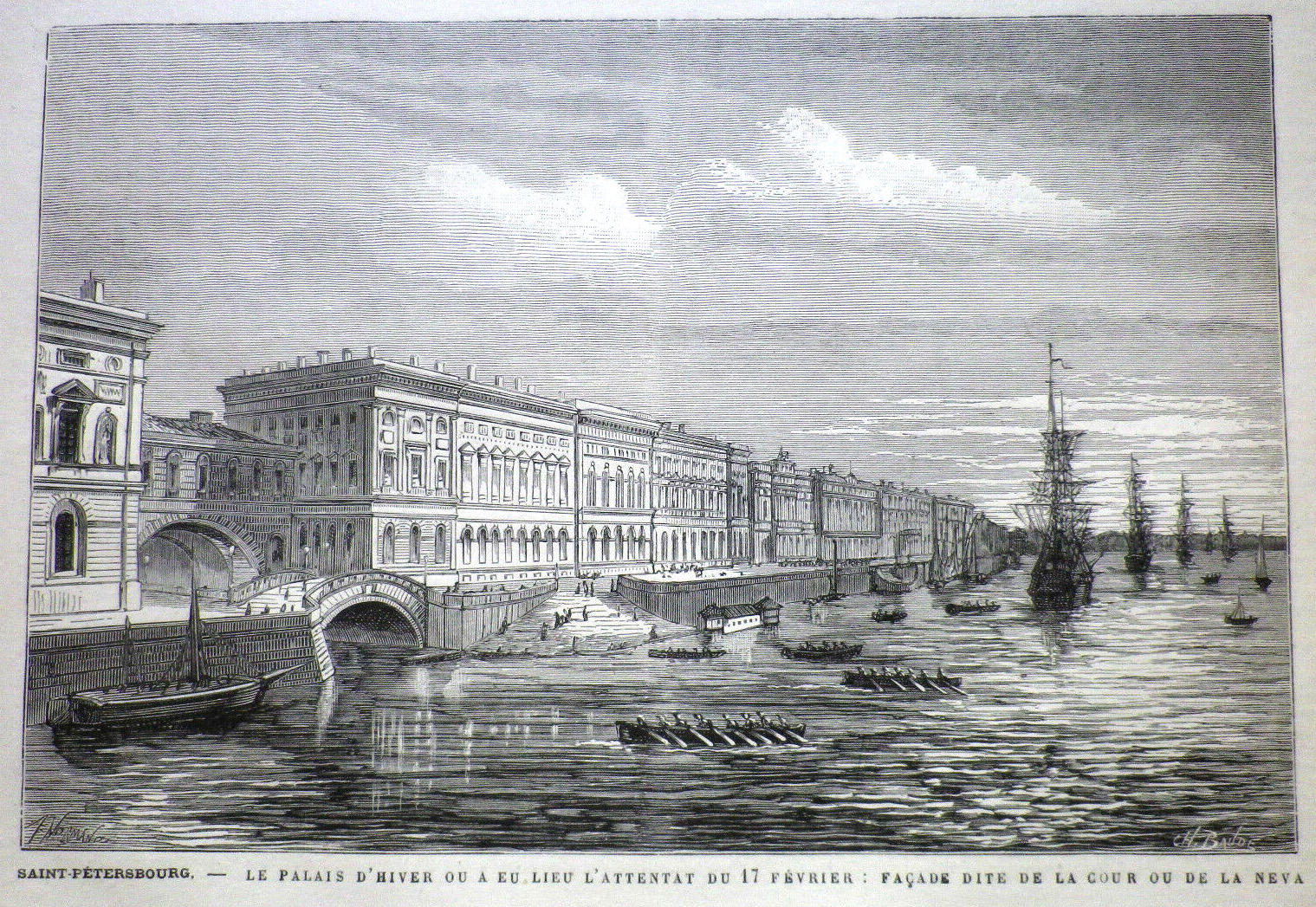 Saint-Pétersbourg - Le palais d'hiver où a eu lieu l'attentat du 17 février [1880] : façade dite de la cour ou de la Neva. Gravure de presse tirée de L'Illustration.